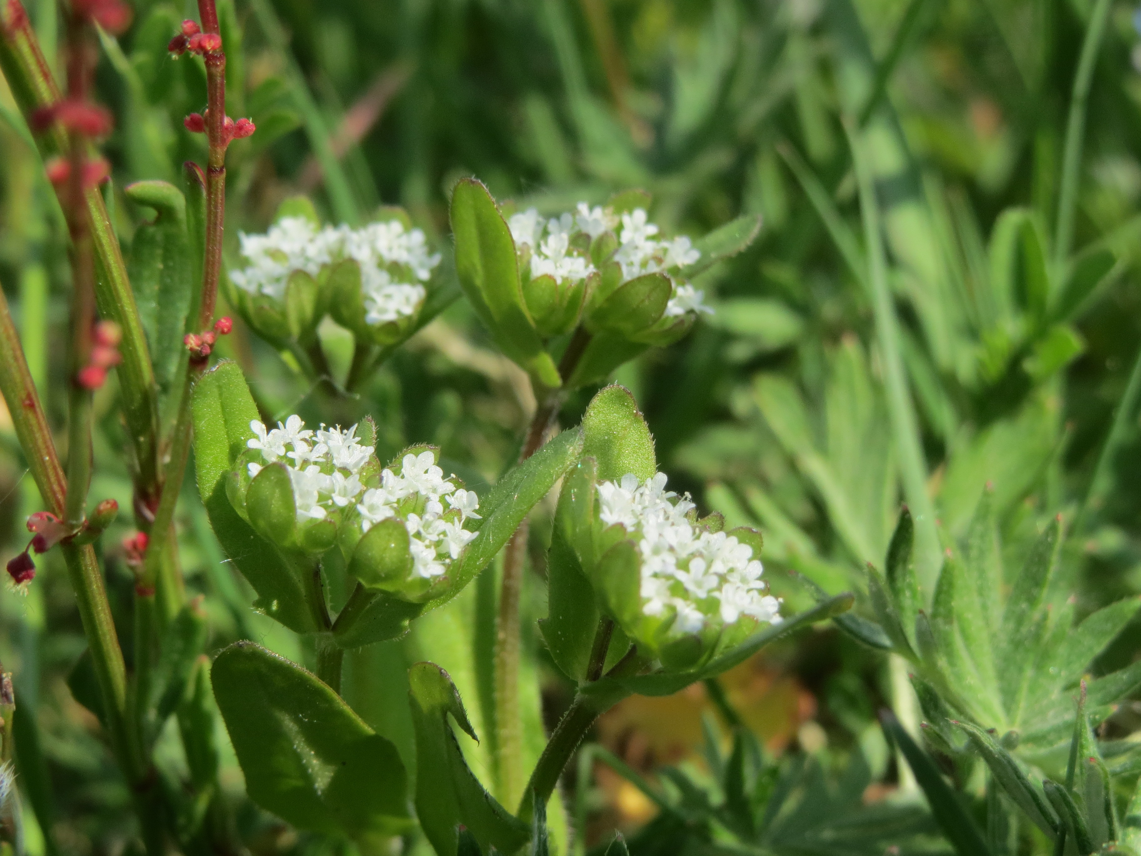 Gewöhnlicher Feldsalat (Valerianella locusta) im Hockenheimer Rheinbogen